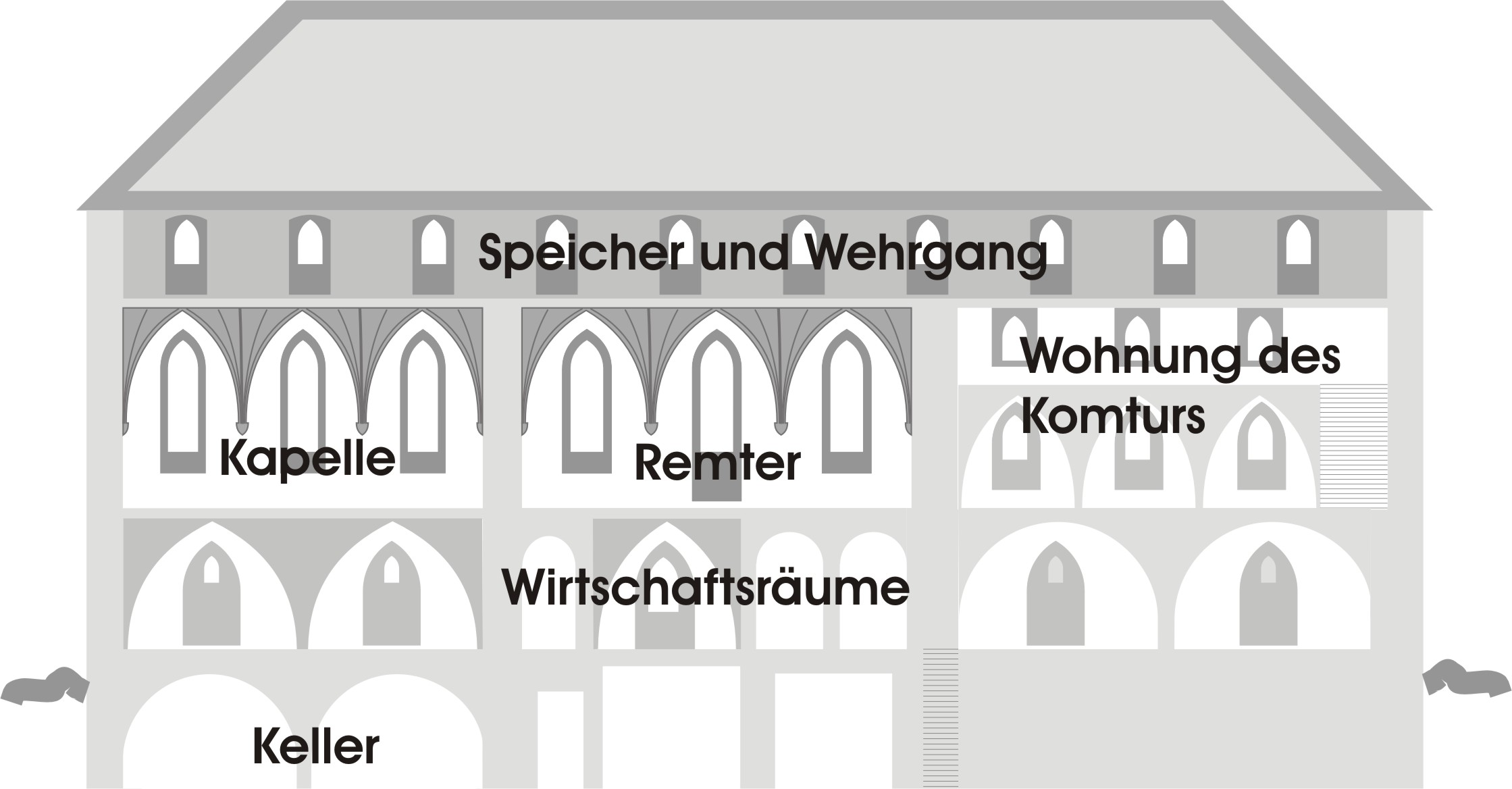 schematischer Querschnitt einer Deutschordensburg